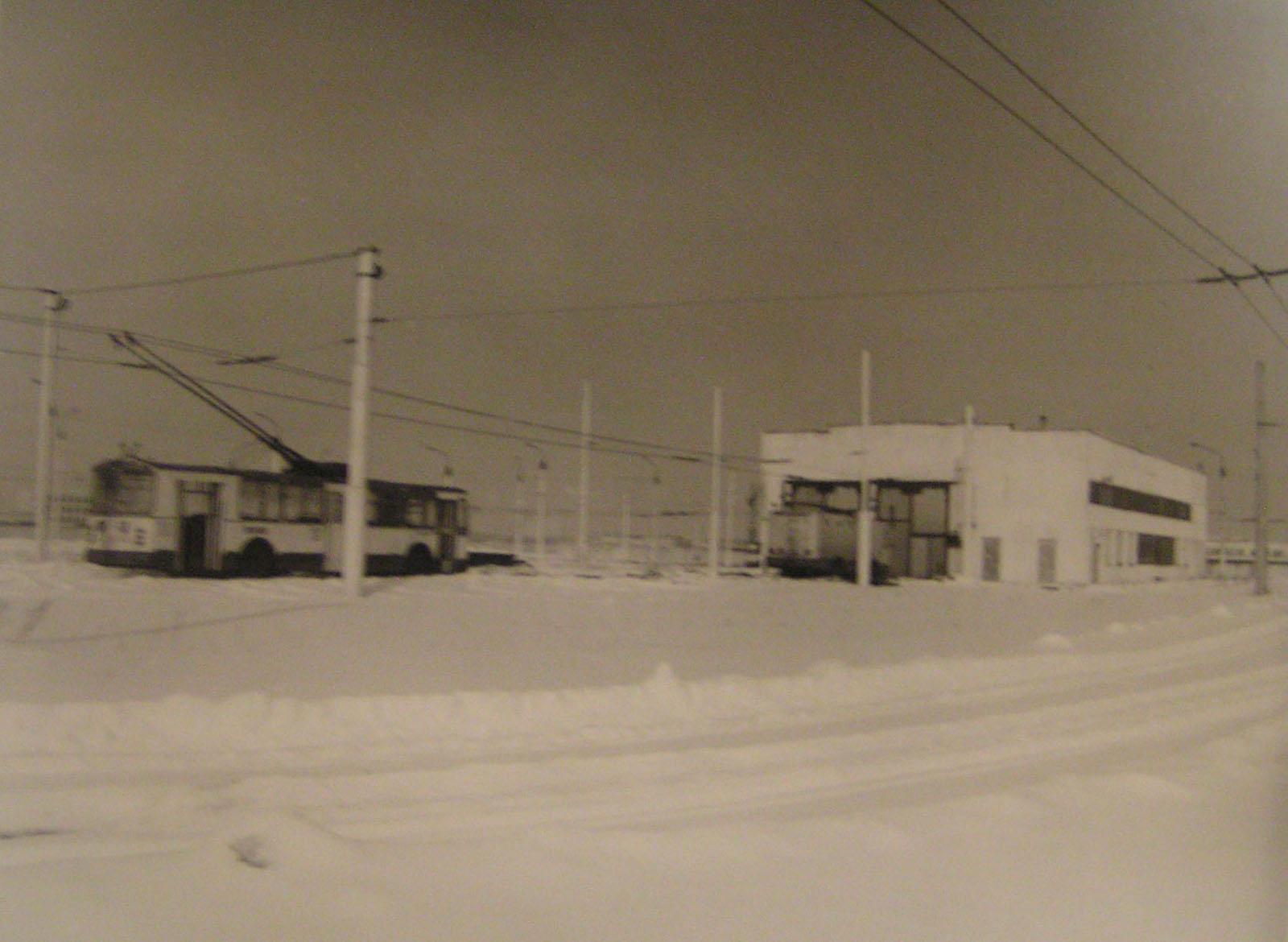 Троллейбусный профилакторий